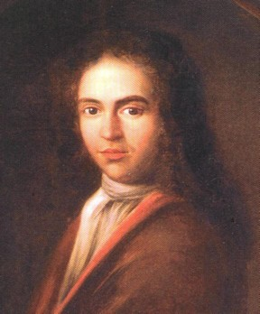 Gemälde von Ivan Gundulic